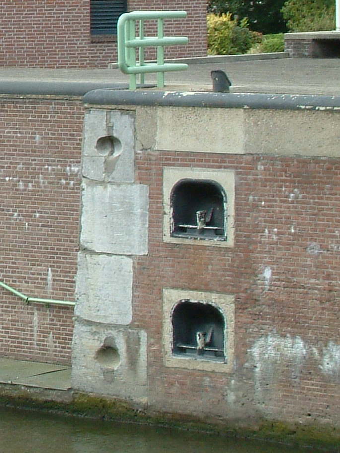 De bij de restauratie ingemetselde nieuwe haalkommen naast de oude, waar de pennen uitgebroken zijn.